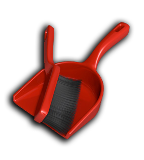 Shovel icon